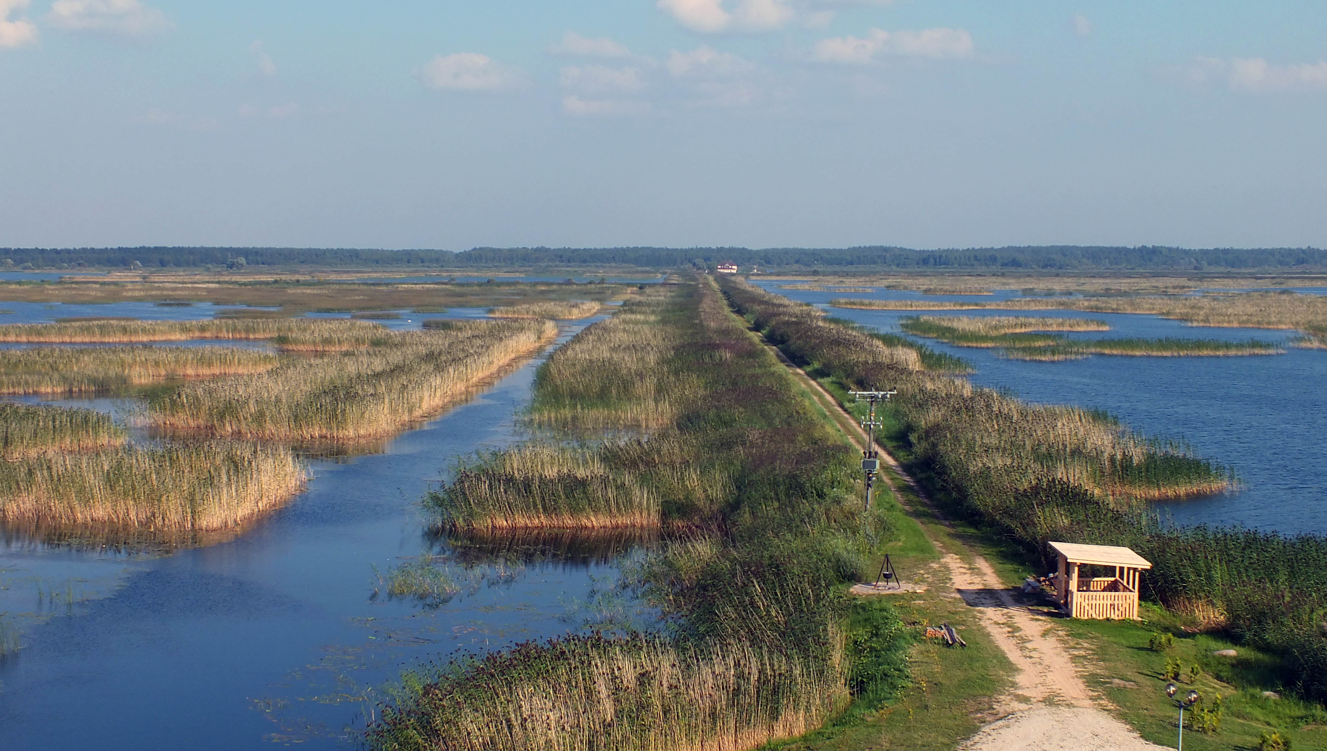 Kvāpānu dīķi no Bākas